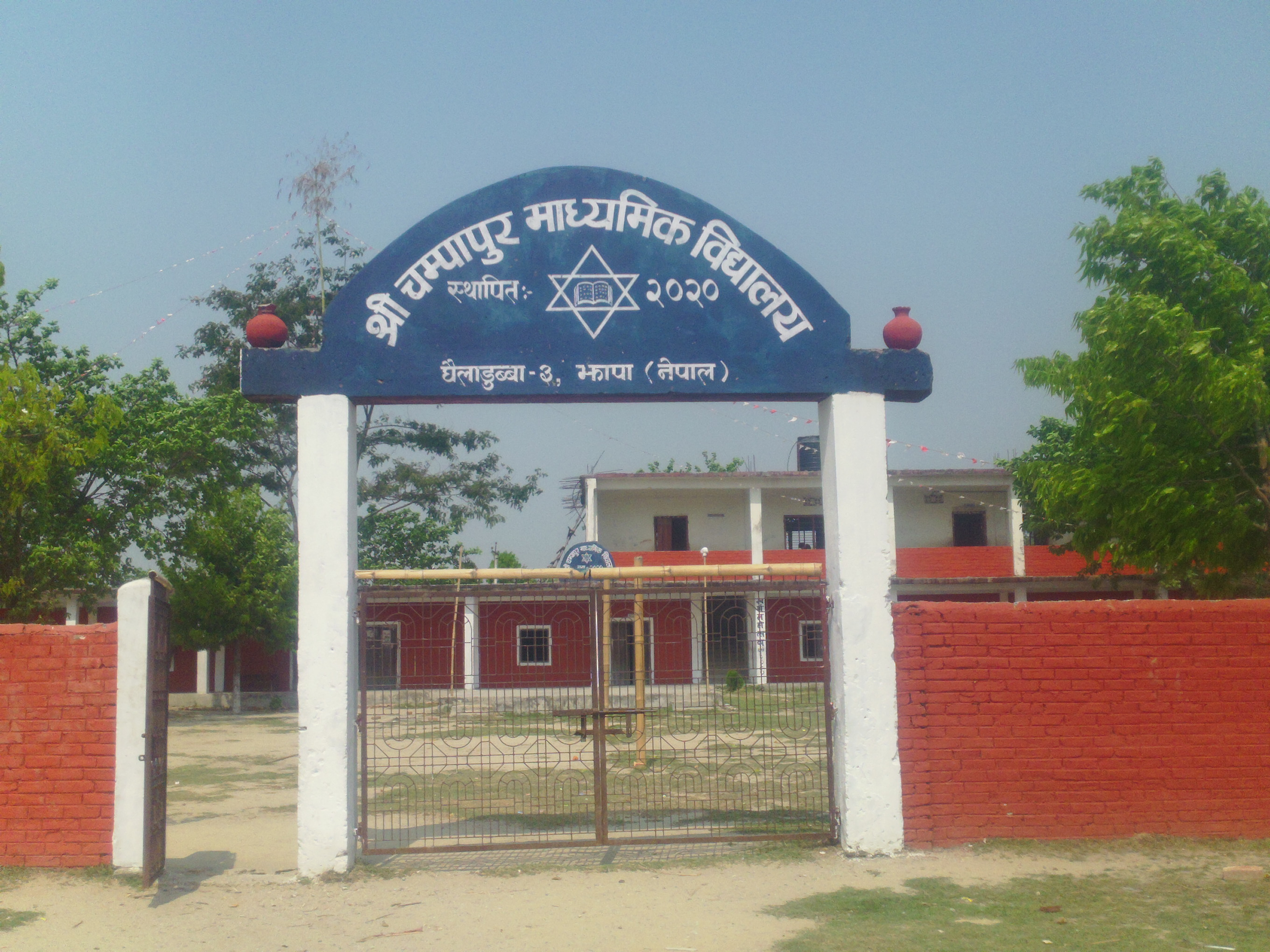 नेपाली: स्कुलको गेट